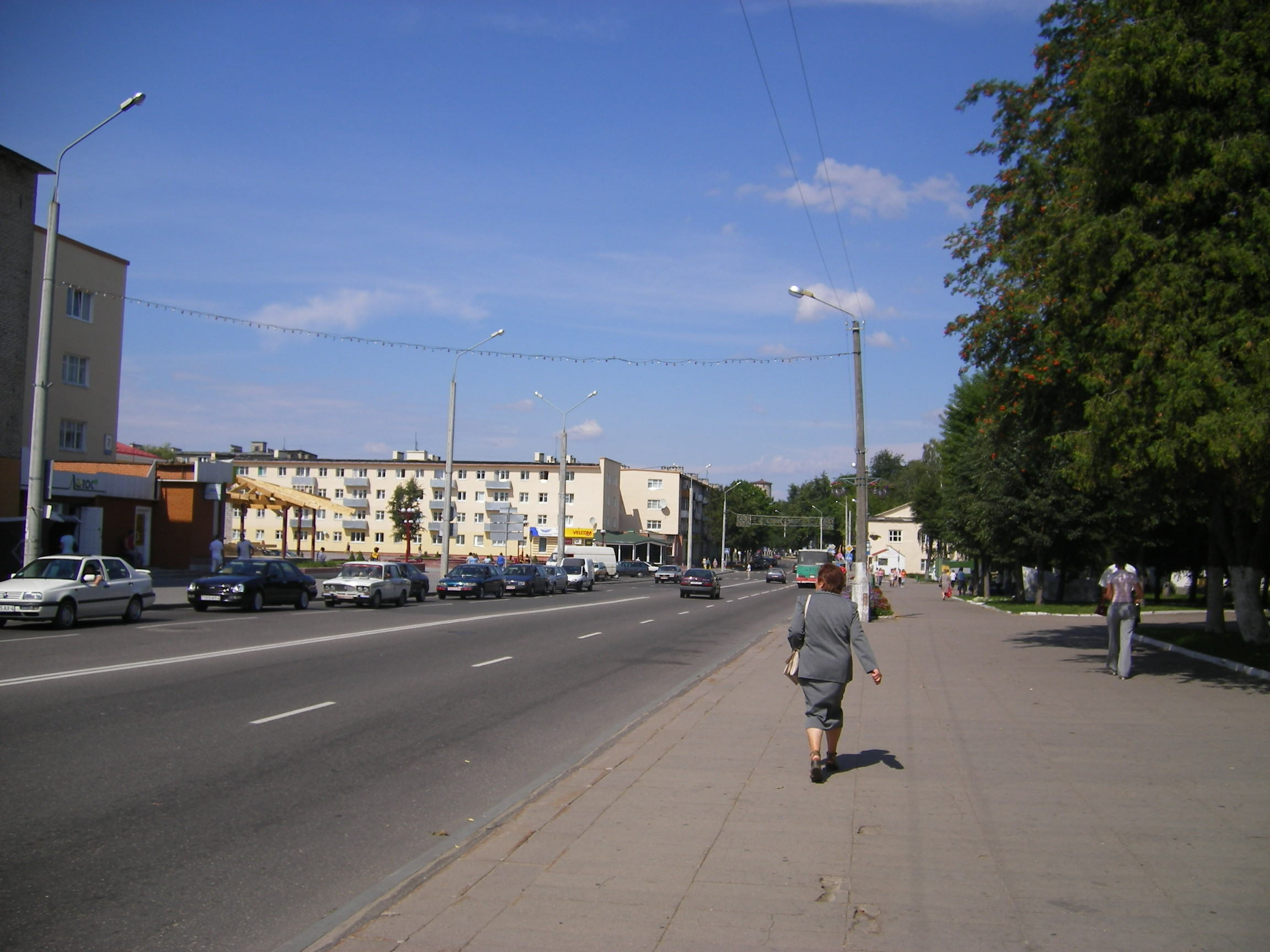 Lida, Sovetskaya St.